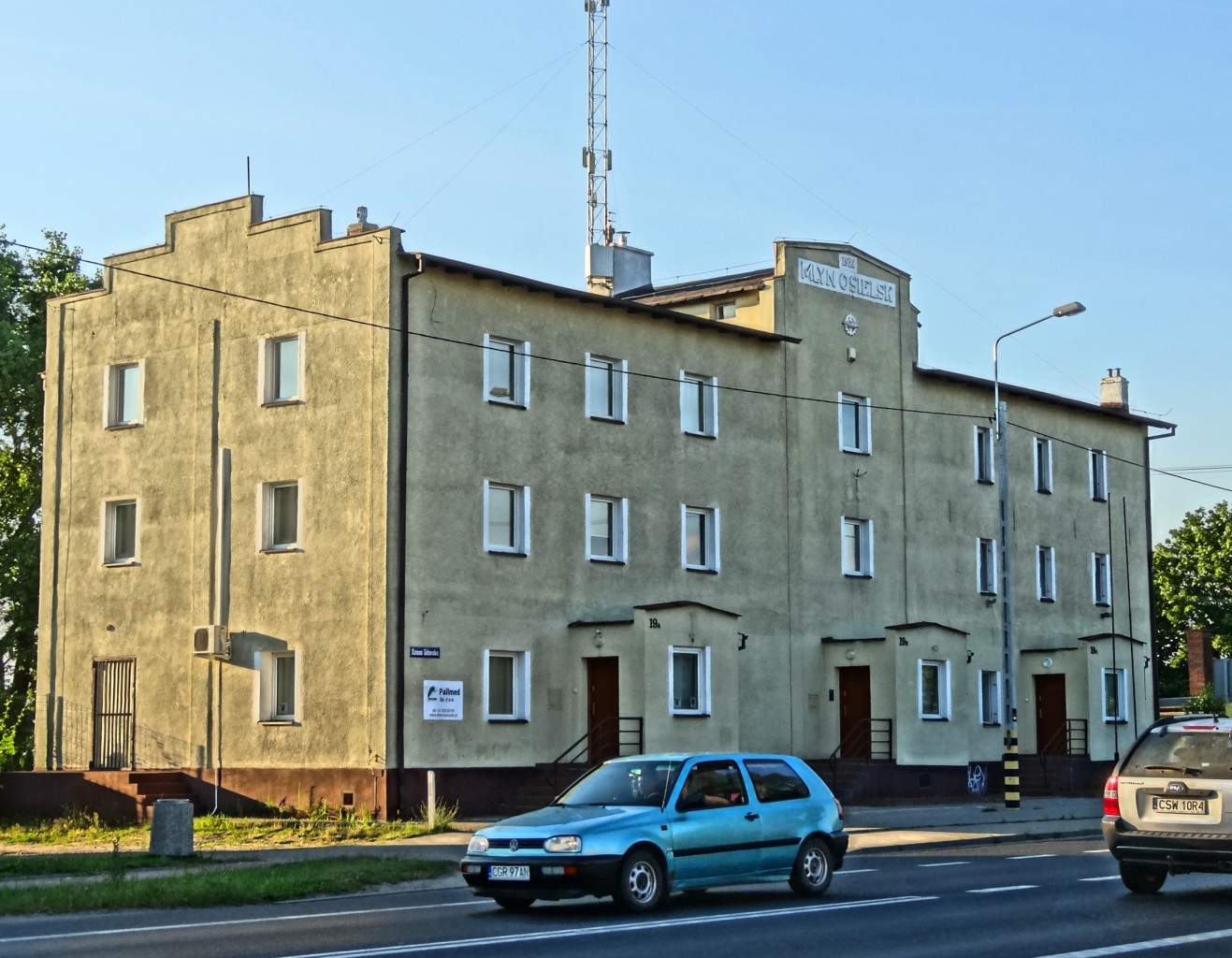 Dawny młyn w Osielsku, gmina Osielsko, powiat bydgoski